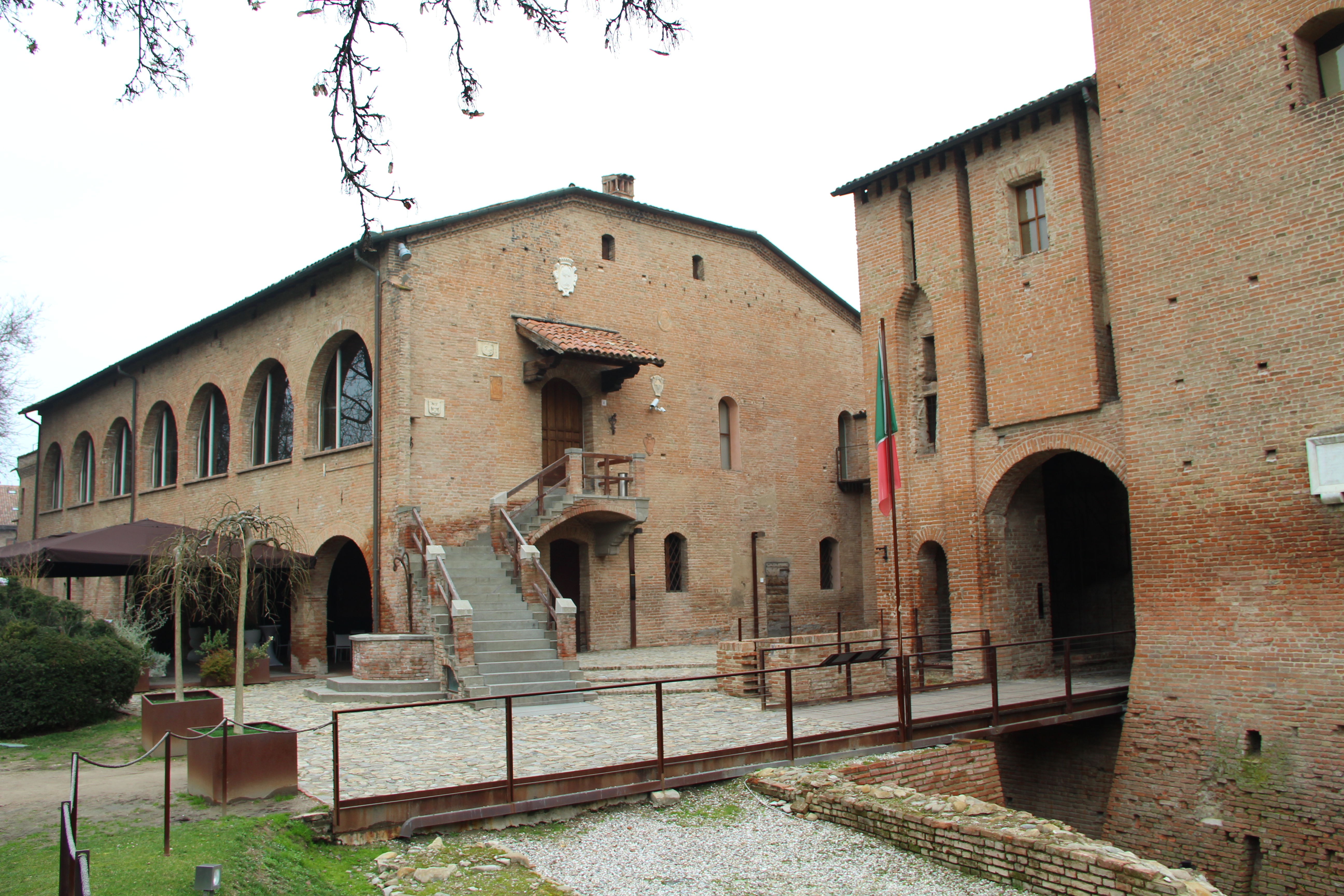 Formigine Fortress